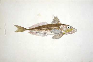 Eutrigla gurnardus (Watercolour on paper)